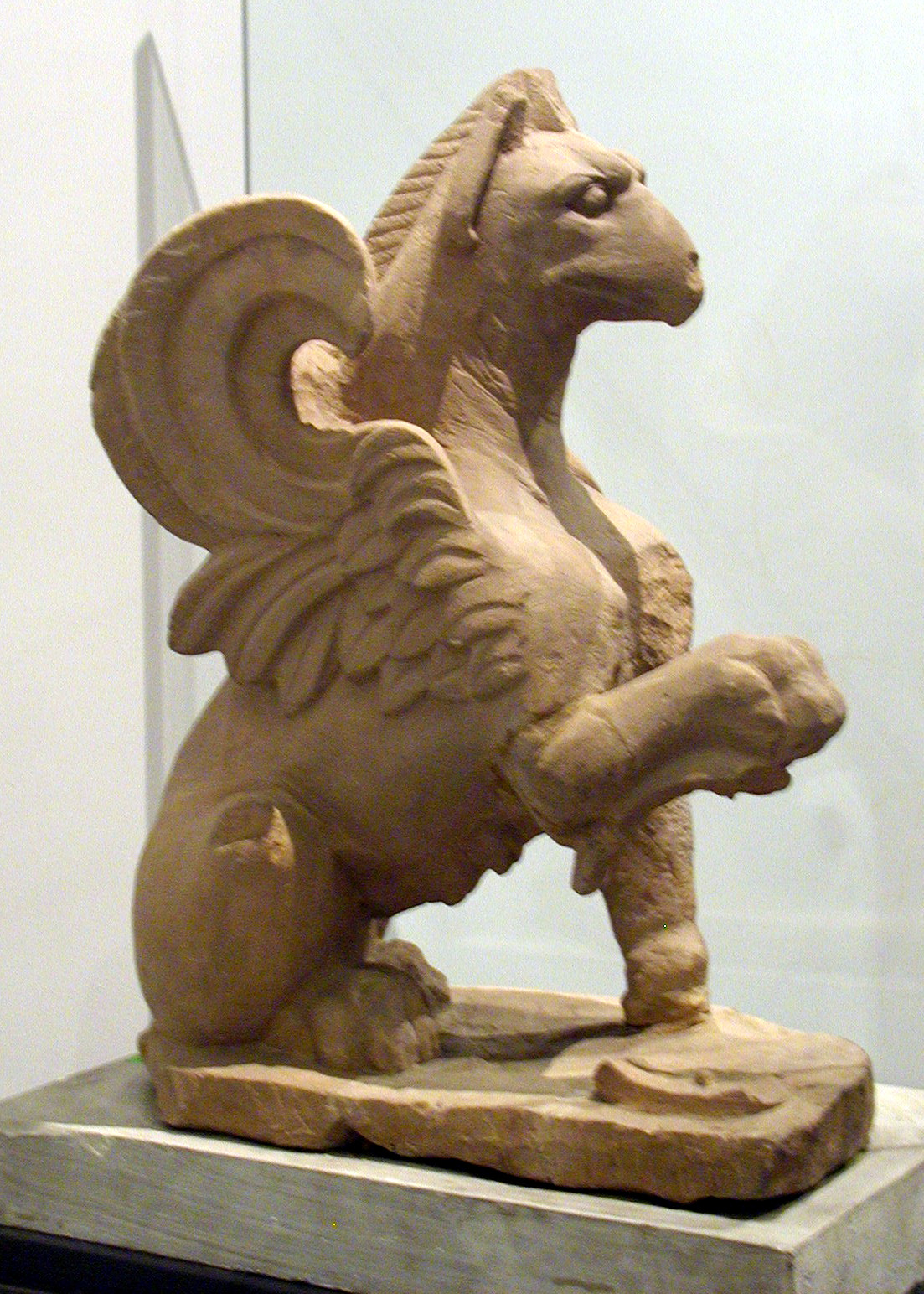 Griffon (en grès, trouvé à Saqqarah), Musée national, Alexandrie, Égypte.